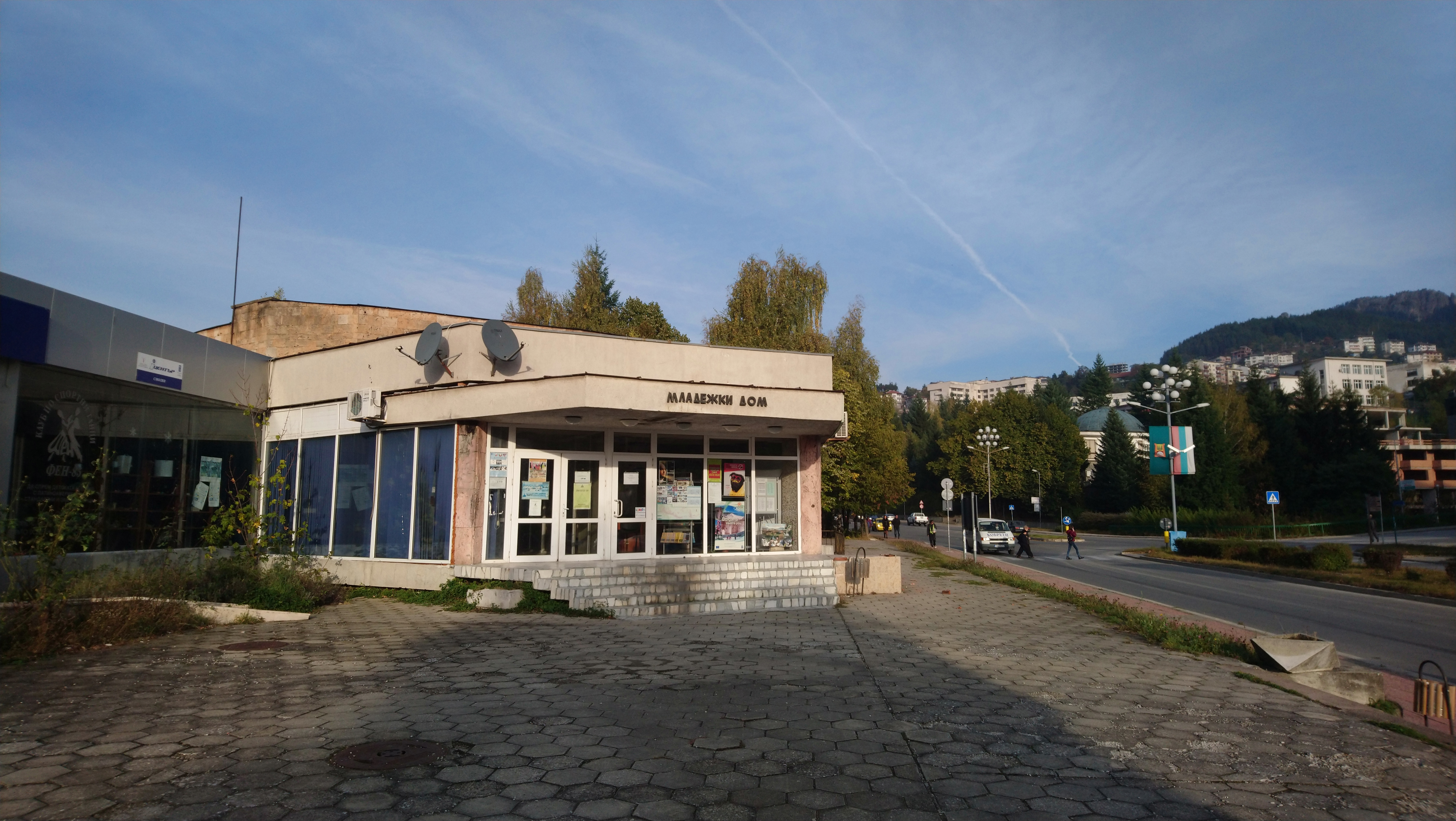 Смолян - младежки дом